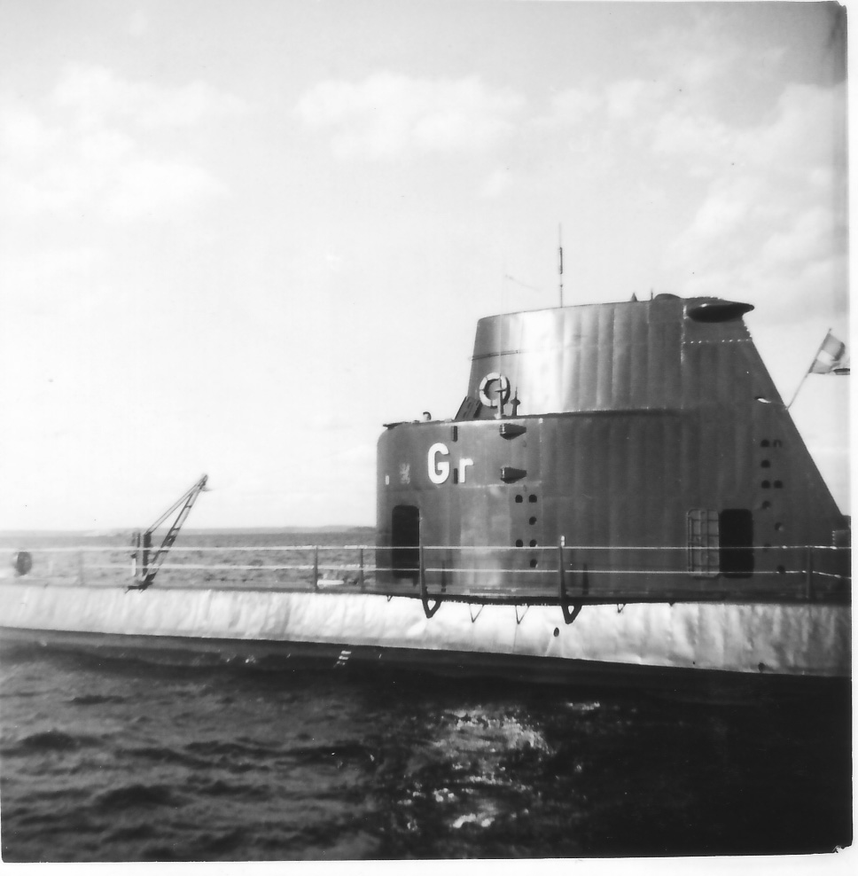 Bild av ubåten Gripen Östersjön augusti 1964